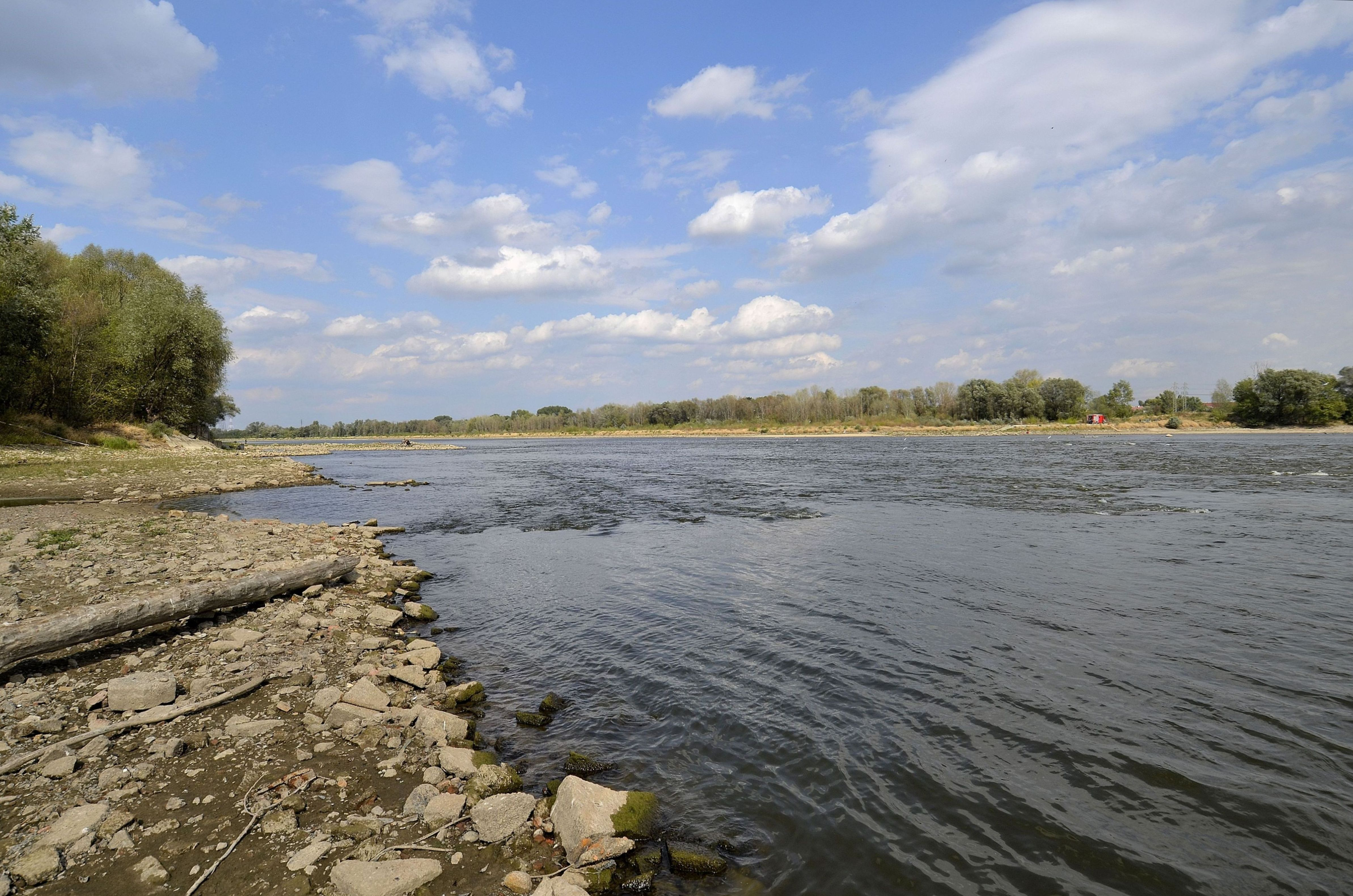 Wisła na wysokości Klubu Sportowego Spójnia Warszawa